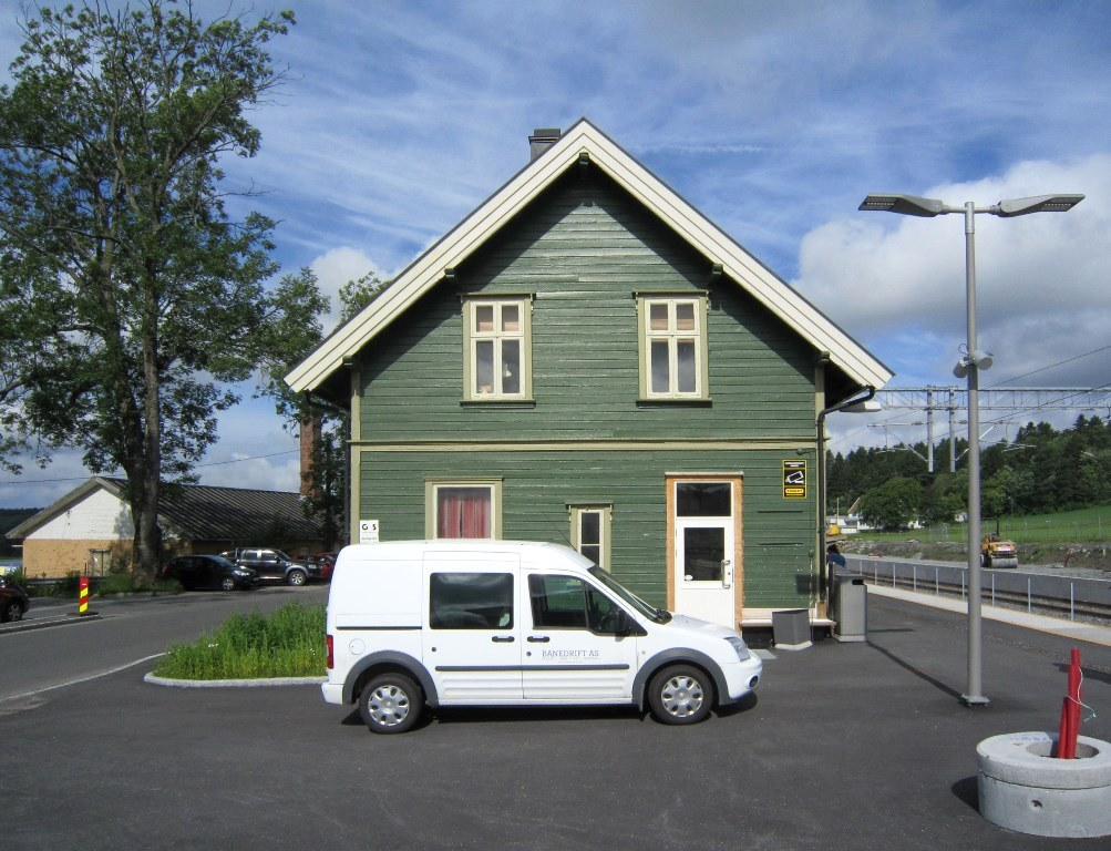 Råde stasjon med fylkesvei 353 til venstre